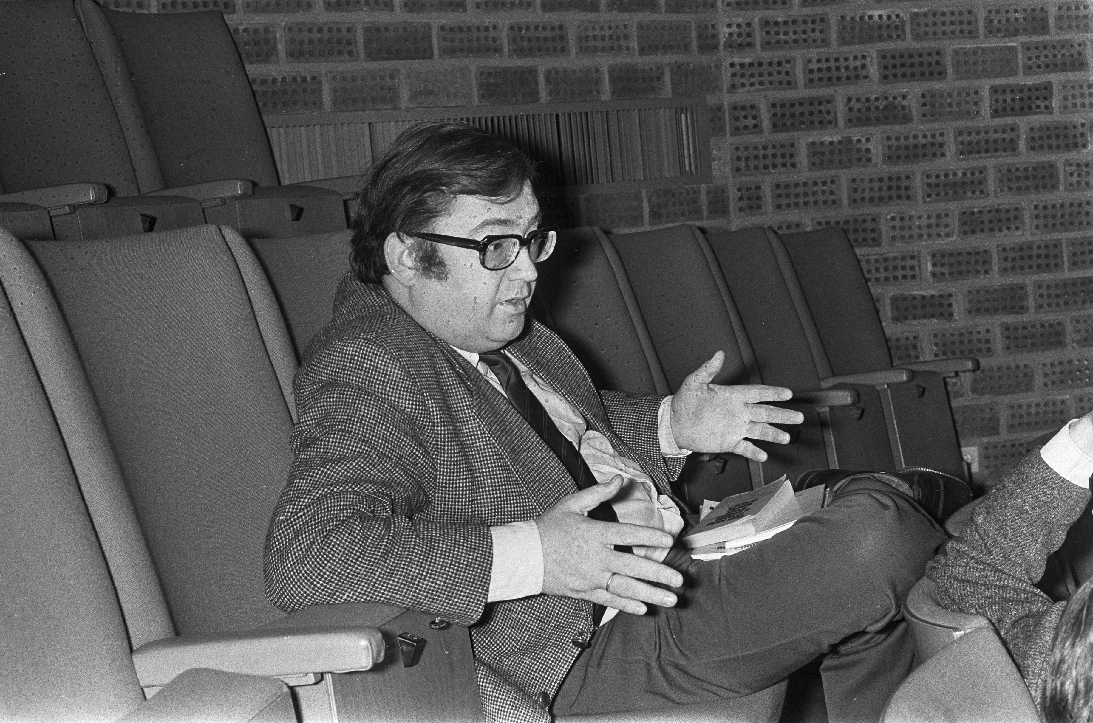 Collectie / Archief : Fotocollectie Anefo Reportage / Serie : Partijcongres D66 in Tiel Beschrijving : Minister Hans Gruijters (Volkshuisvesting) Datum : 9 maart 1974 Locatie : Gelderland, Tiel Trefwoorden : congressen, ministers, politieke partijen Persoonsnaam : Gruijters, Hans Fotograaf : Hans Peters / Anefo Auteursrechthebbende : Nationaal Archief Materiaalsoort : Negatief (zwart/wit) Nummer archiefinventaris : bekijk toegang 2.24.01.05 Bestanddeelnummer : 927-0531